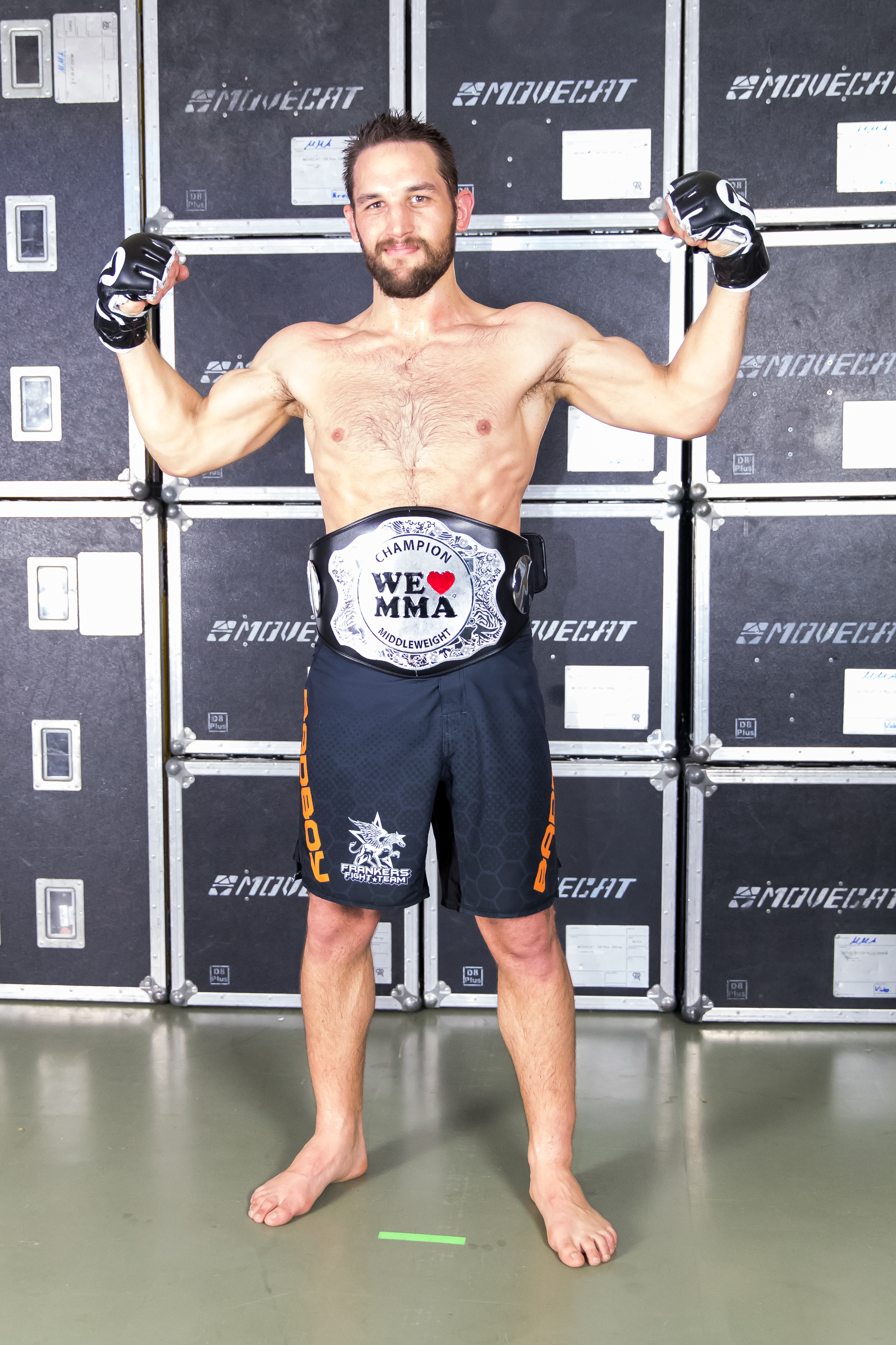 during We love MMA: Mixed Martial Arts at Friedrich-Ebert-Halle, Ludwigshafen, Rheinland-Pfalz, Germany on 2017-04-22, Photo: Sven Mandel